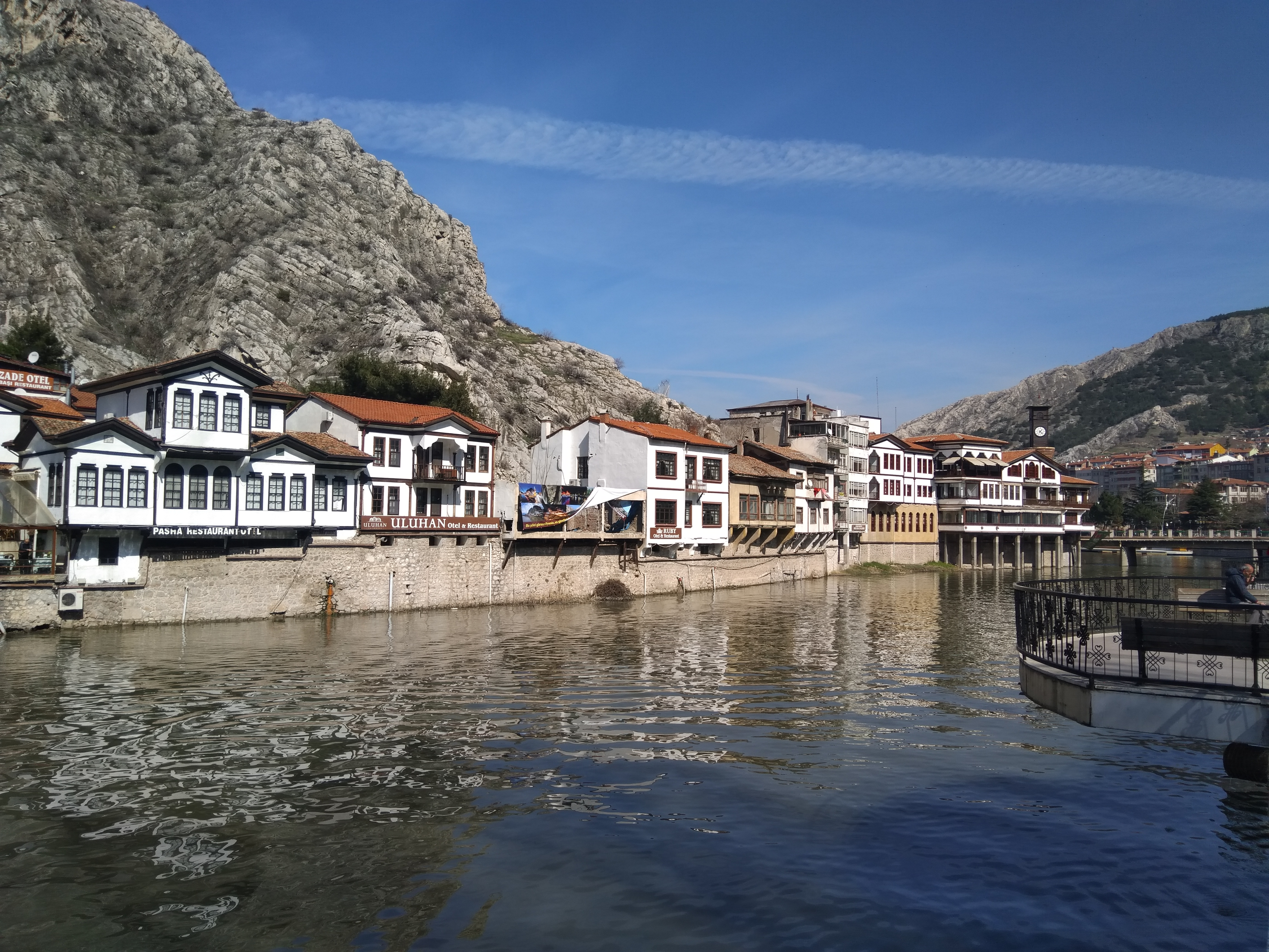 Amasya şehir merkezinden bir görünüm.